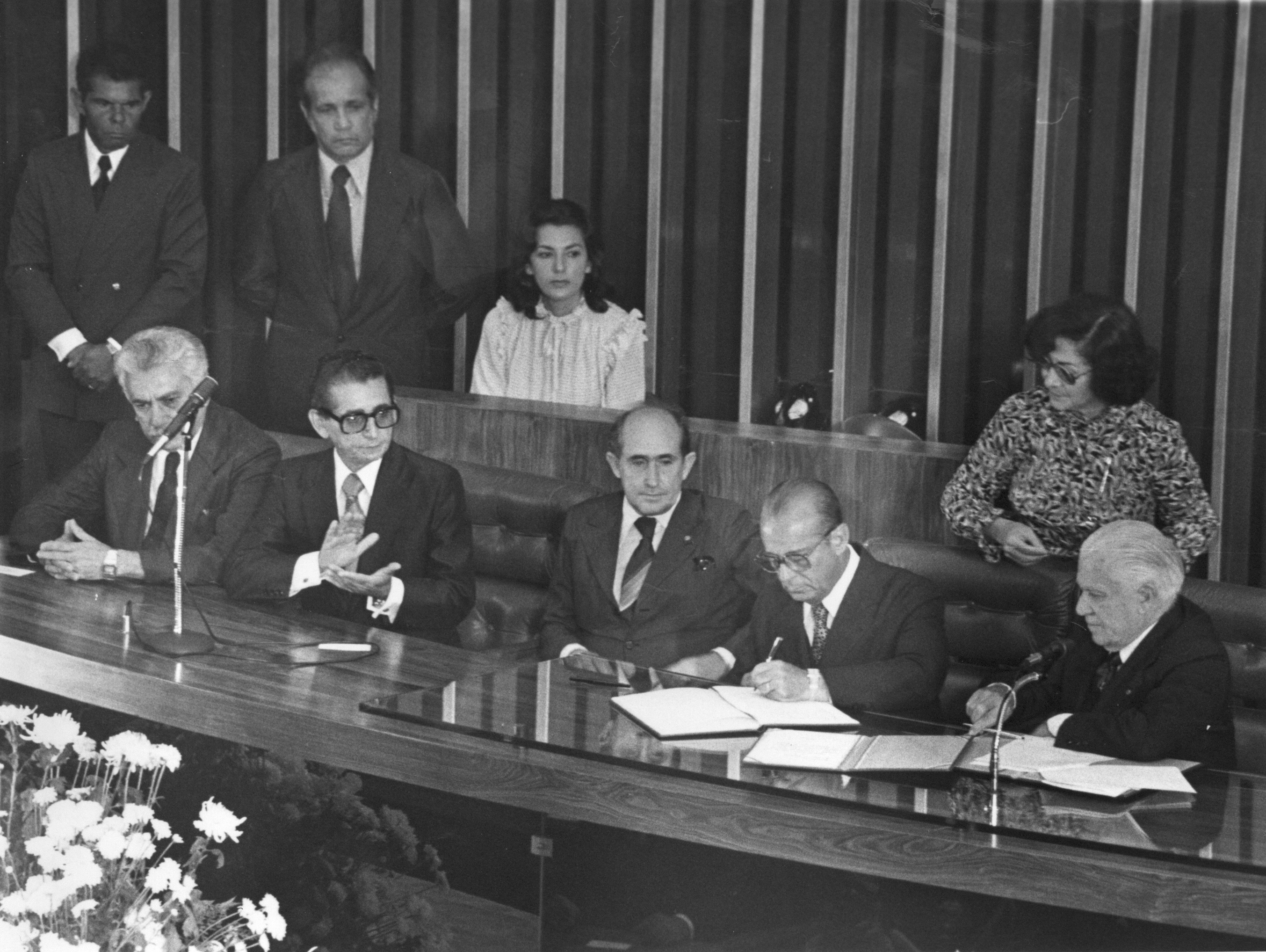 Posse do presidente João Figueiredo em 15 de março de 1979, em sessão conjunta do Congresso Nacional, presidida pelo Senador Luís Viana. O mandato presidencial, de acordo com a Emenda Constitucional nº 08/77, passou a ser de 6 anos. João Figueiredo foi o último dos Presidentes Militares. Foi eleito por eleição indireta. Foto: Senado Federal